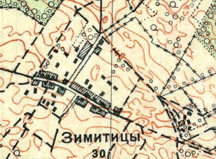 Топографическая карта Ленинградской области, квадрат О-35-23-А-г (Черенковицы), деревня Зимитицы